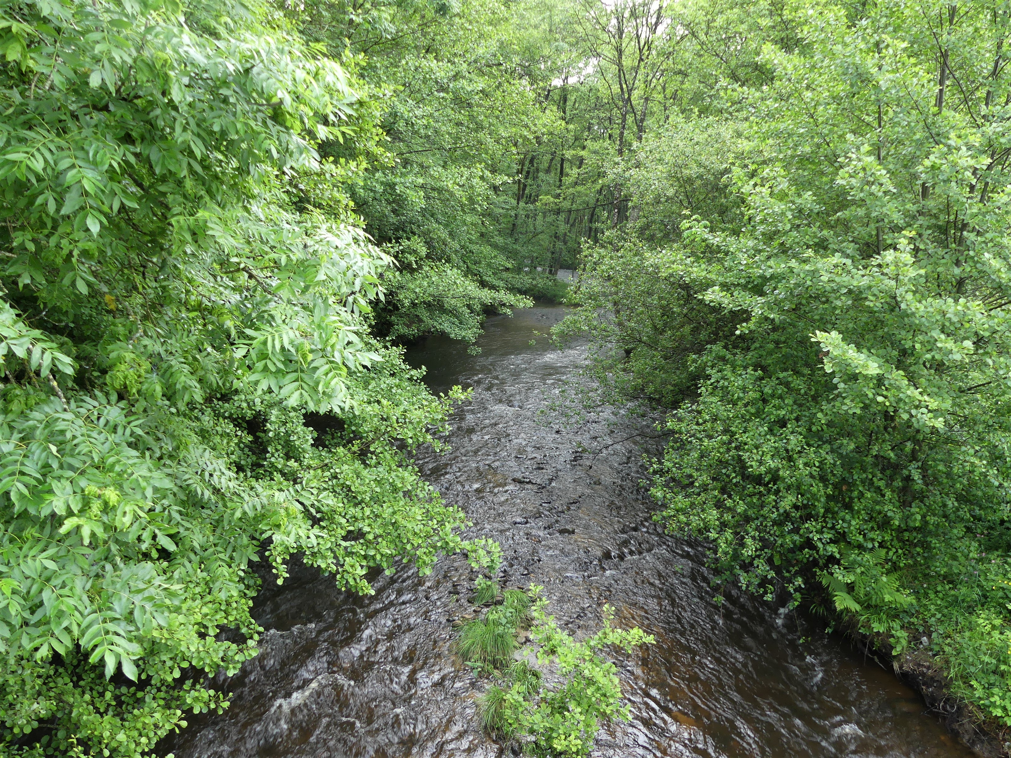 La Creuse sur la commune de Croze, département de la Creuse, France. Vue prise en direction de l'amont.